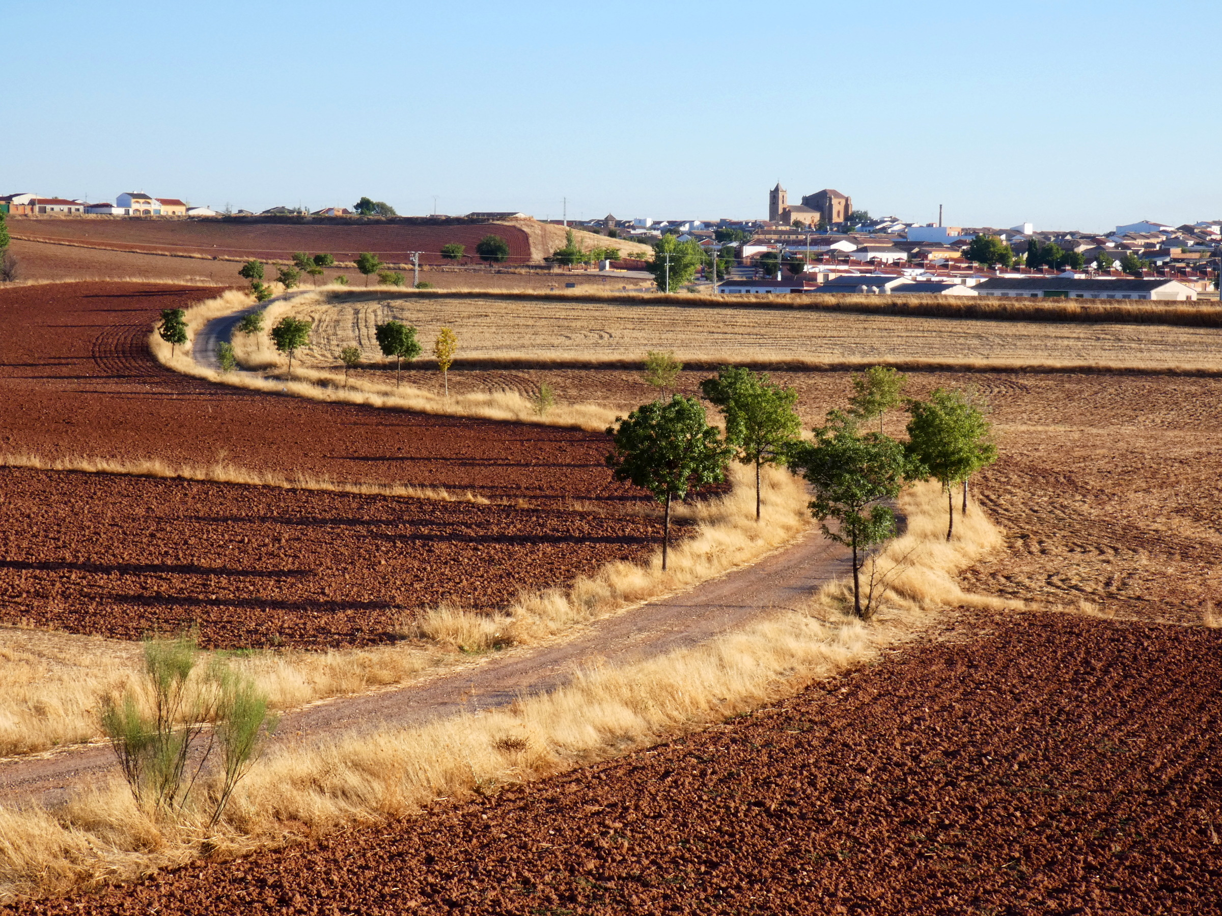 Entrada al pueblo Torre de Juan Abad desde el suroeste, por el camino de la torre de la Higuera. Comunidad Autónoma de Castilla La Mancha, provincia de Ciudad Real.